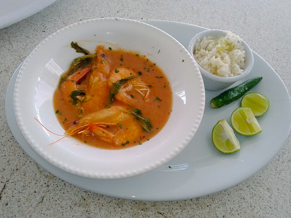 Huatape de camarón, ríquisima sopa veracruzana